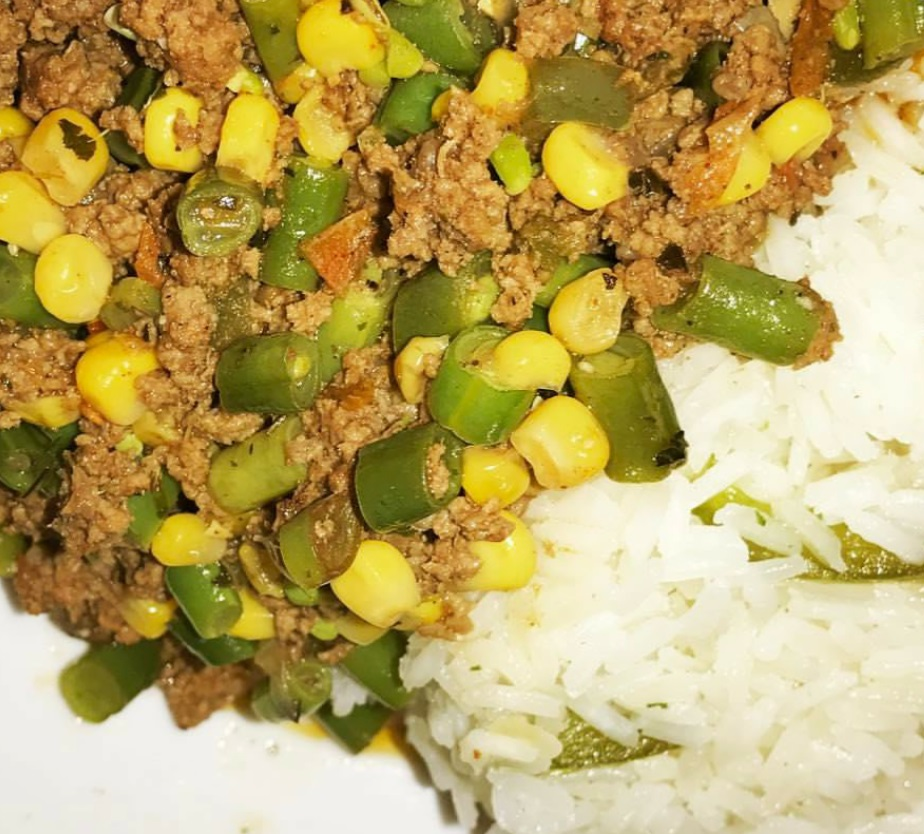 Versión jpg del archivo Archivo:Picadillo de vainicas.png